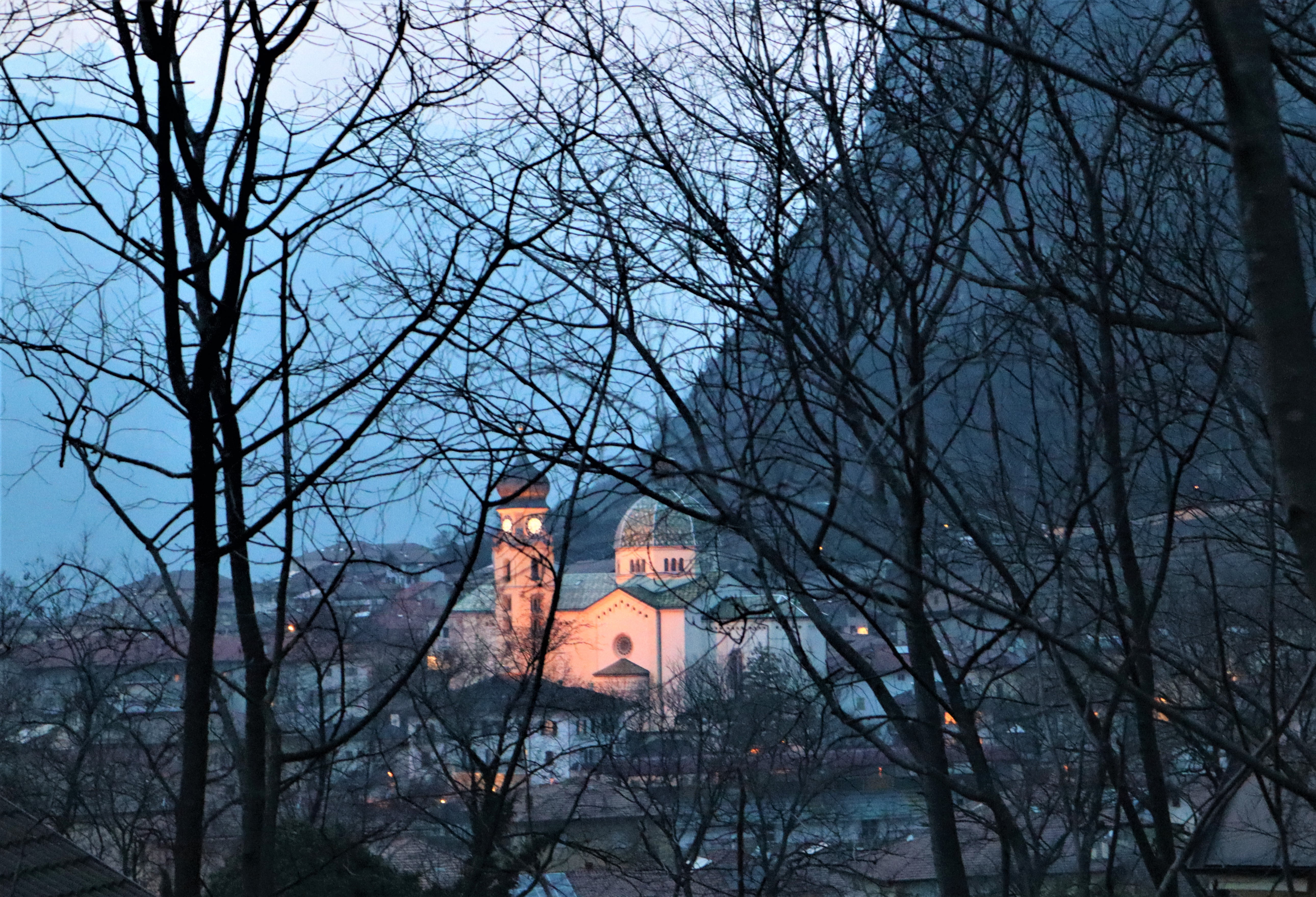 Vista dall'area cimiteriale della chiesa di San Michele Arcangelo